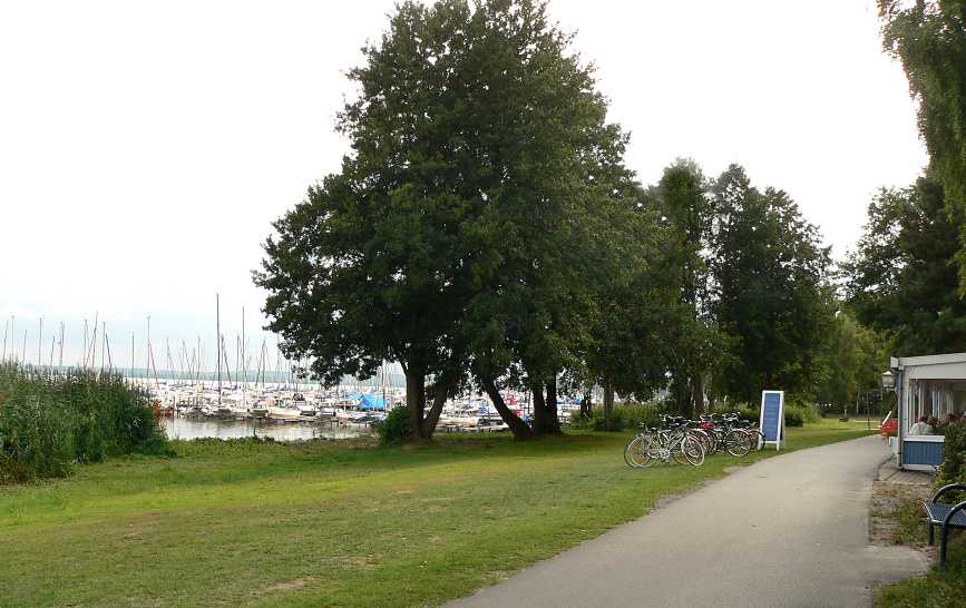 Mardorf Promenade